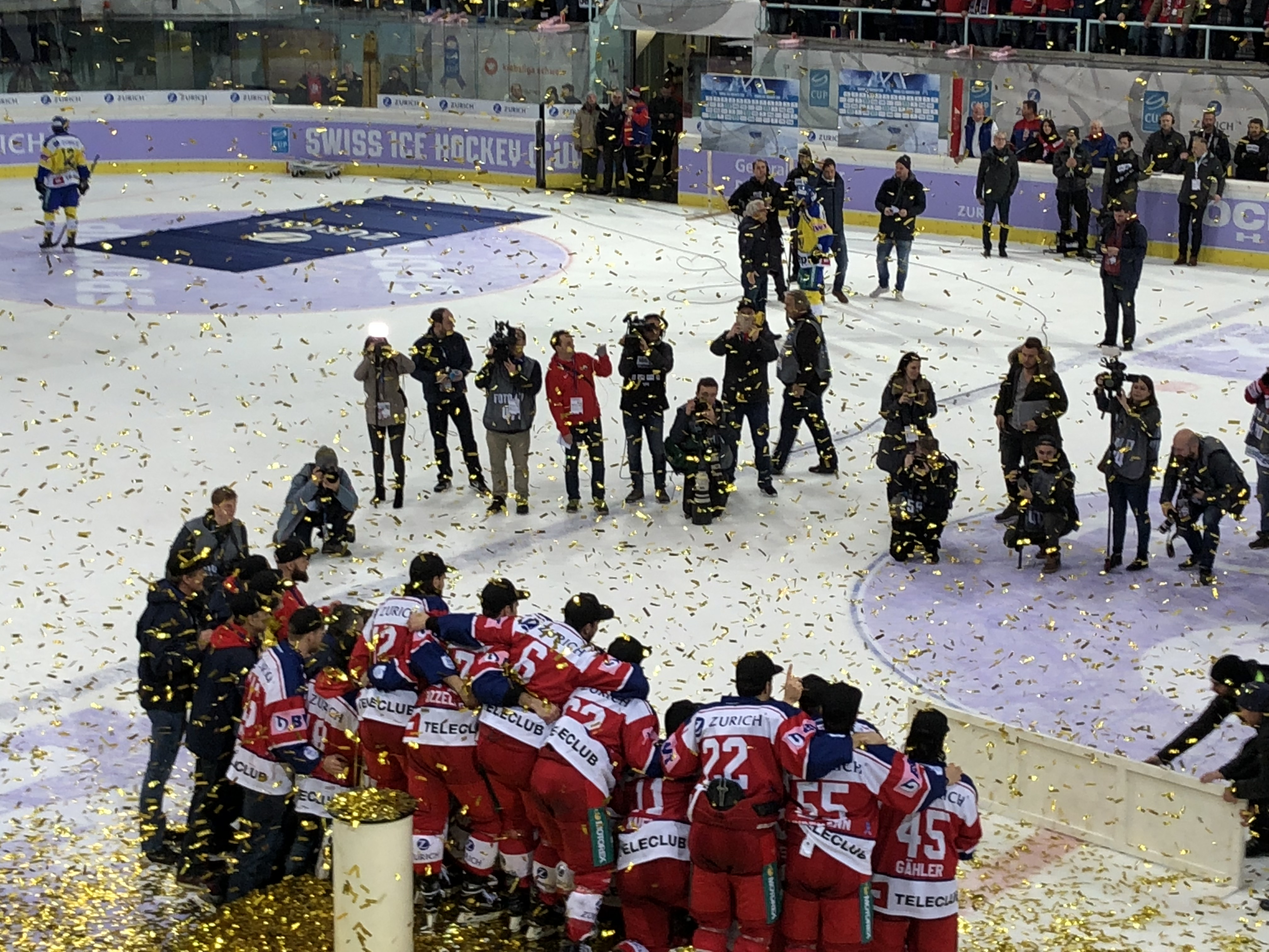 Siegerehrung nach dem Cup Final am 4. Februar 2018 – SC Rapperswil-Jona gegen HC Davos